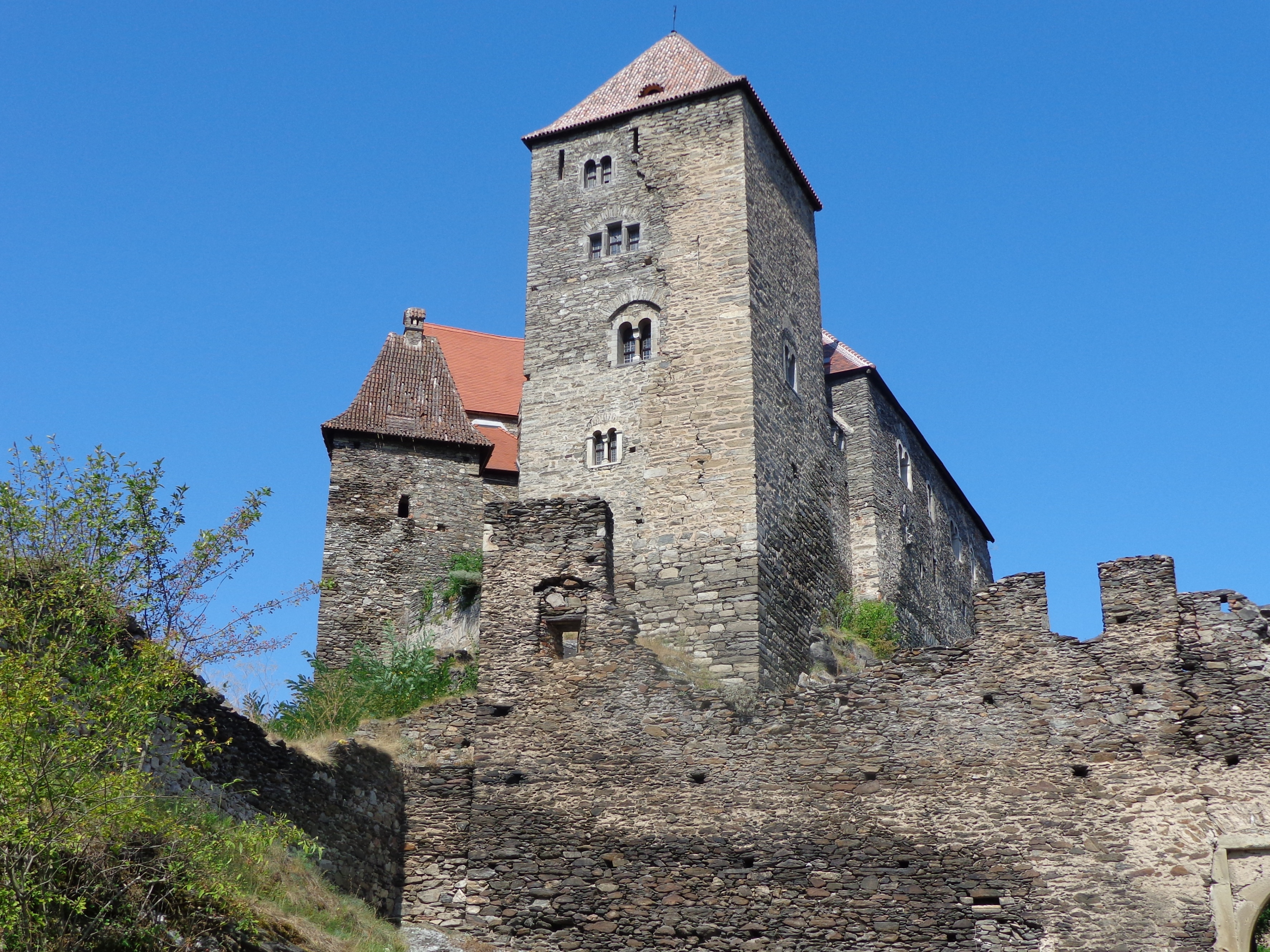 Burg Hardegg in Niederösterreich.